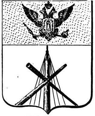 Герб города Бобруйска